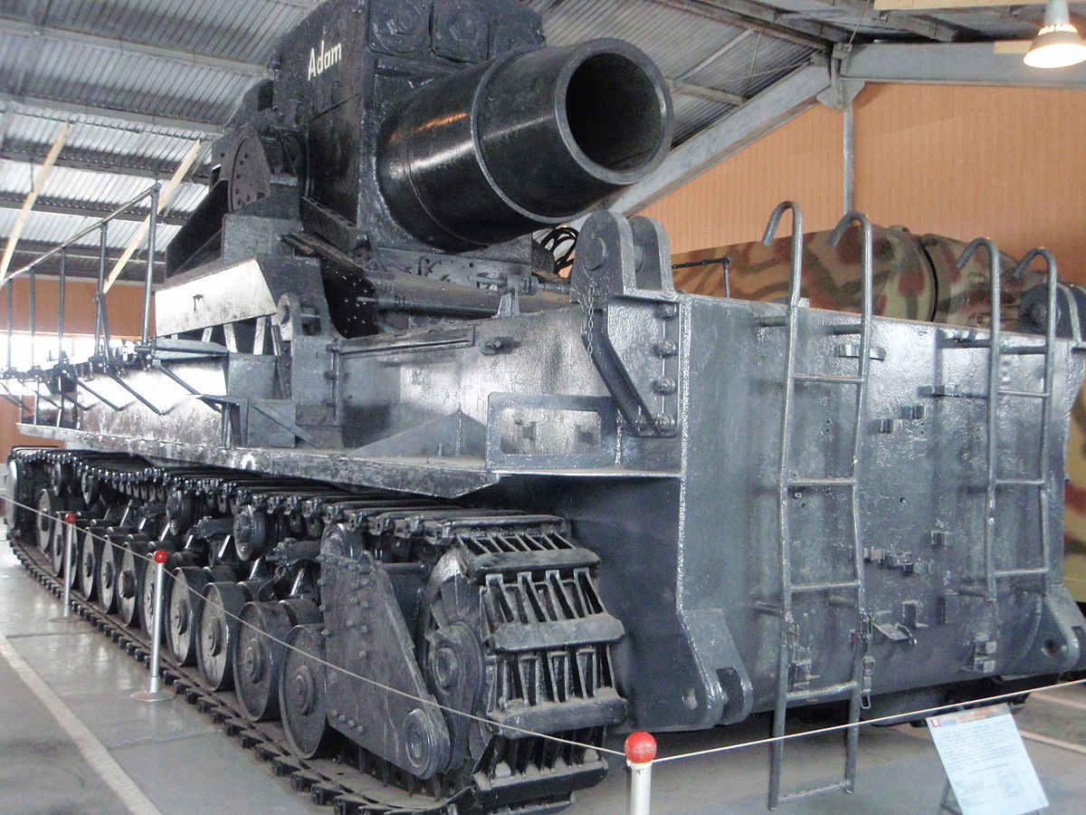 Karl Gerat Kubinka Tank MÜzesinde.